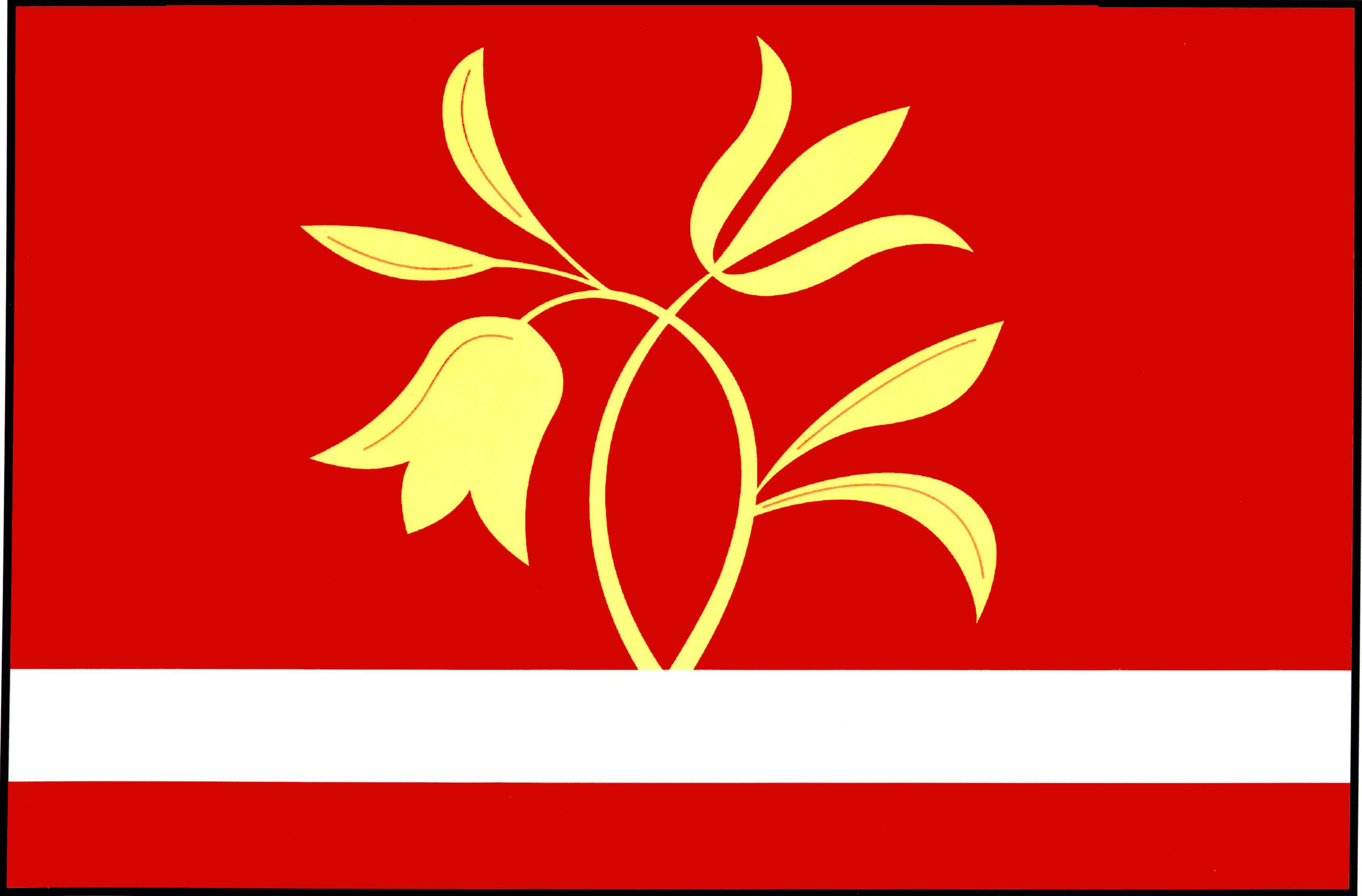 vlajka obce Čermná